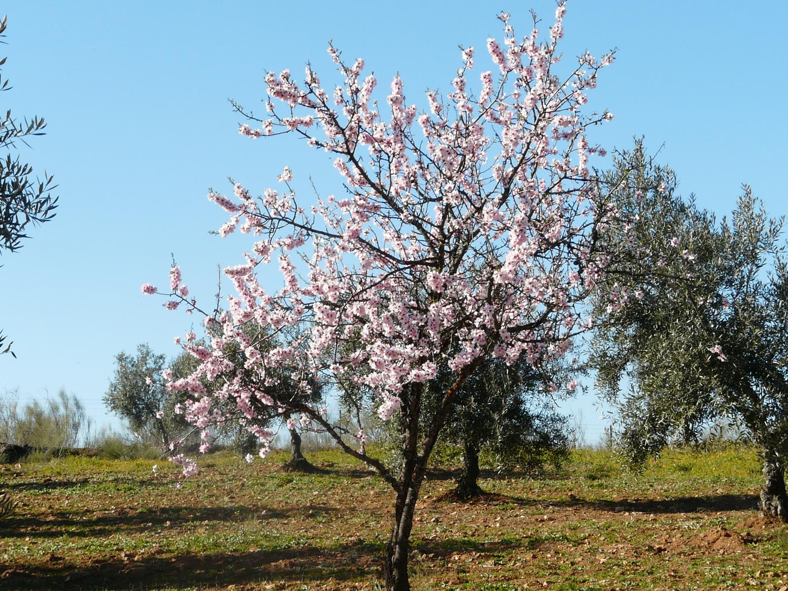 Almendro en flor